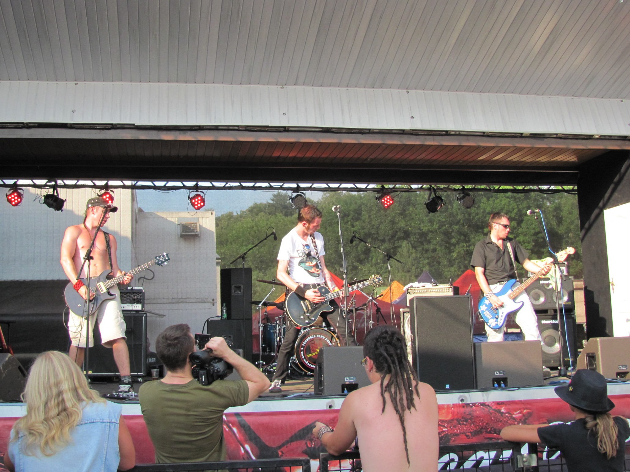 Zakázaný ovoce, Coca-Cola stage, Masters of Rock 2010